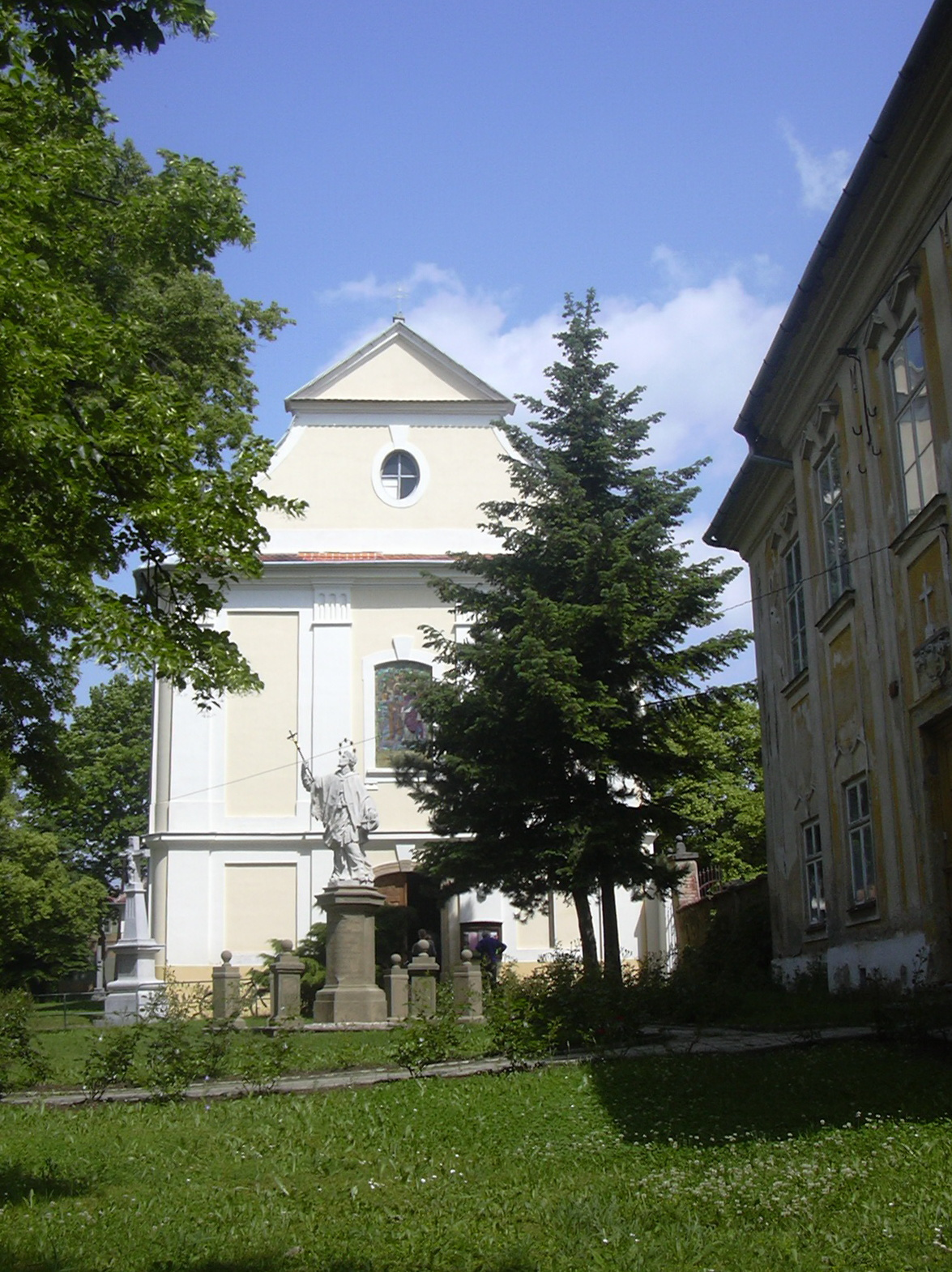 Farní kostel sv.Filipa a Jakuba (Královopolské Vážany - Czech republic)